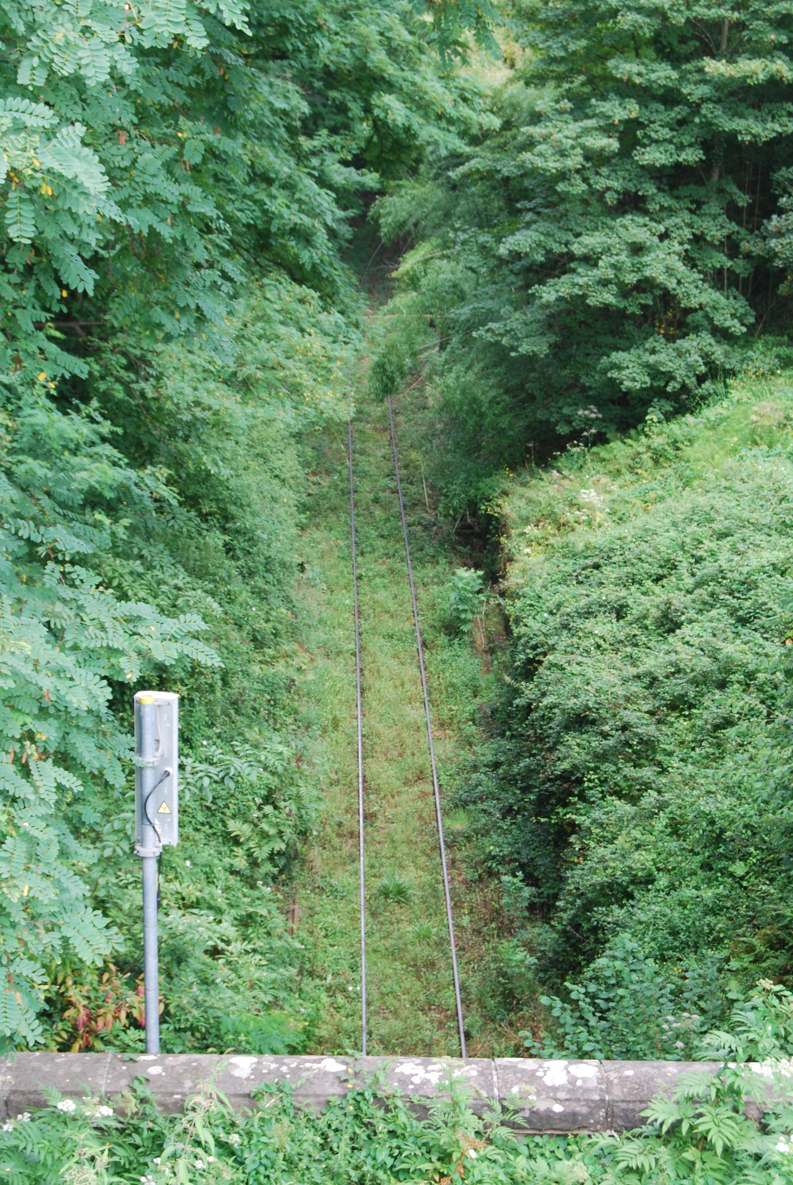 La ligne de Bayonne à Allées Marines à l'été 2014. Vers le haut : direction la ligne Bordeaux - Irun et la gare de Bayonne. Vers le bas : entrée du tunnel direction le port de Bayonne.